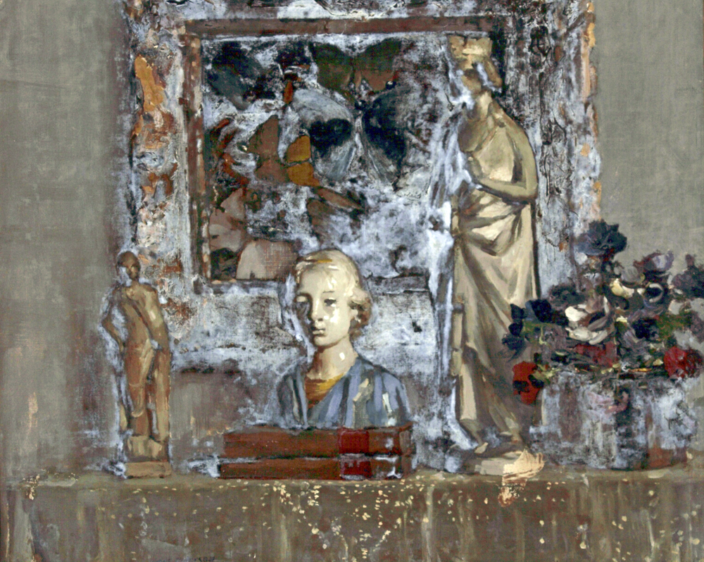 óleo sobre lienzo - 63,5 cm. x 76,2 cm. - Williamson Art Gallery & Museum